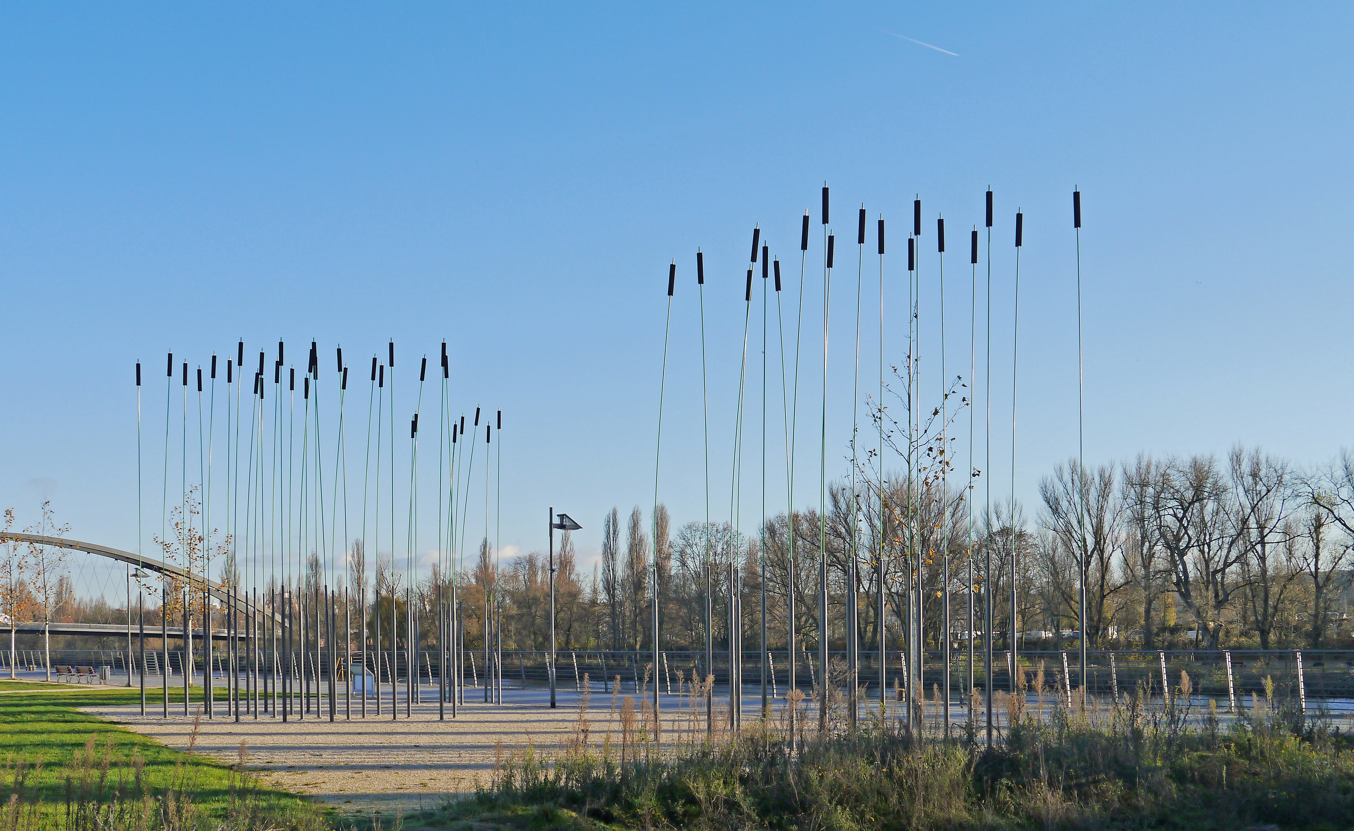 Die Station Flusswind des Regionalpark Rhein-Main und seinem überregionalem Mainuferprojekt Klimaroute, von Kelsterbach bis Mühlheim im Hafenpark am Mainufer in Frankfurt.